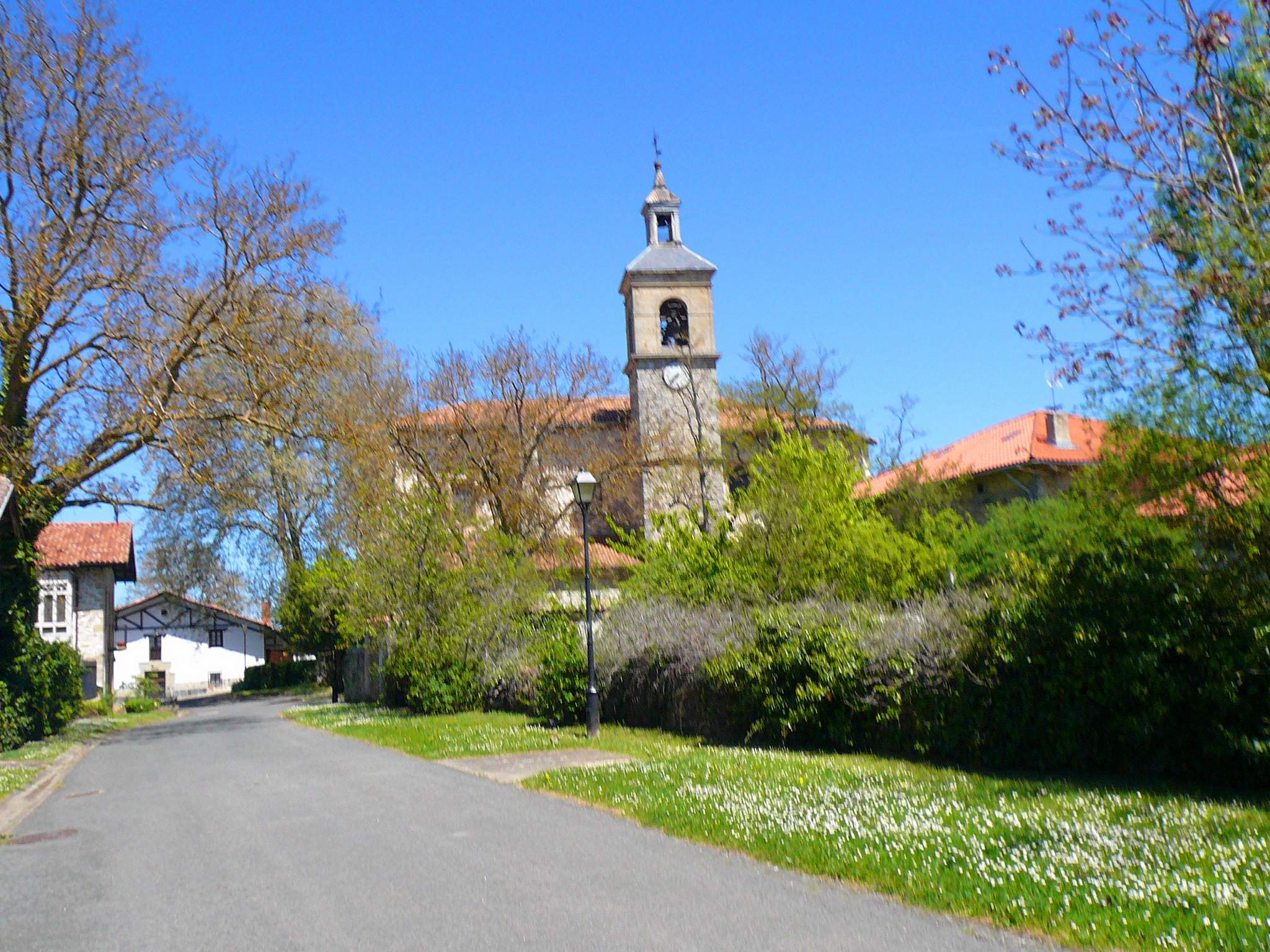 Foronda (Vitoria, Álava)